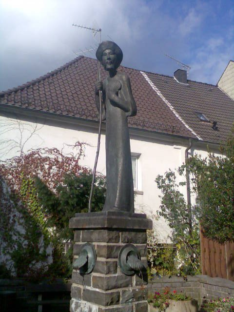 Jakobusbrunnen in Breckerfeld, Deutschland